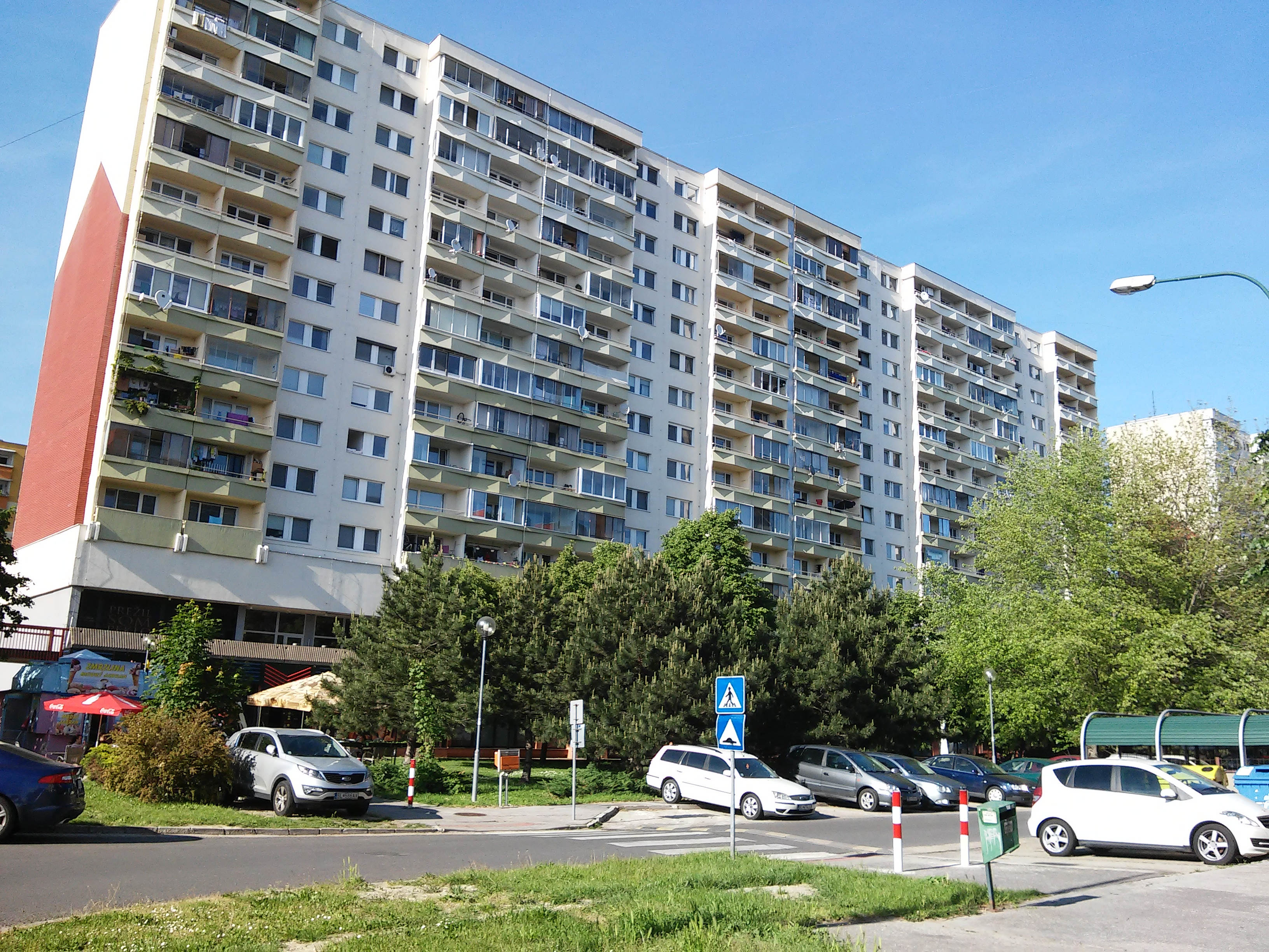 Mánesovo námestie, Petržalka, Bratislava